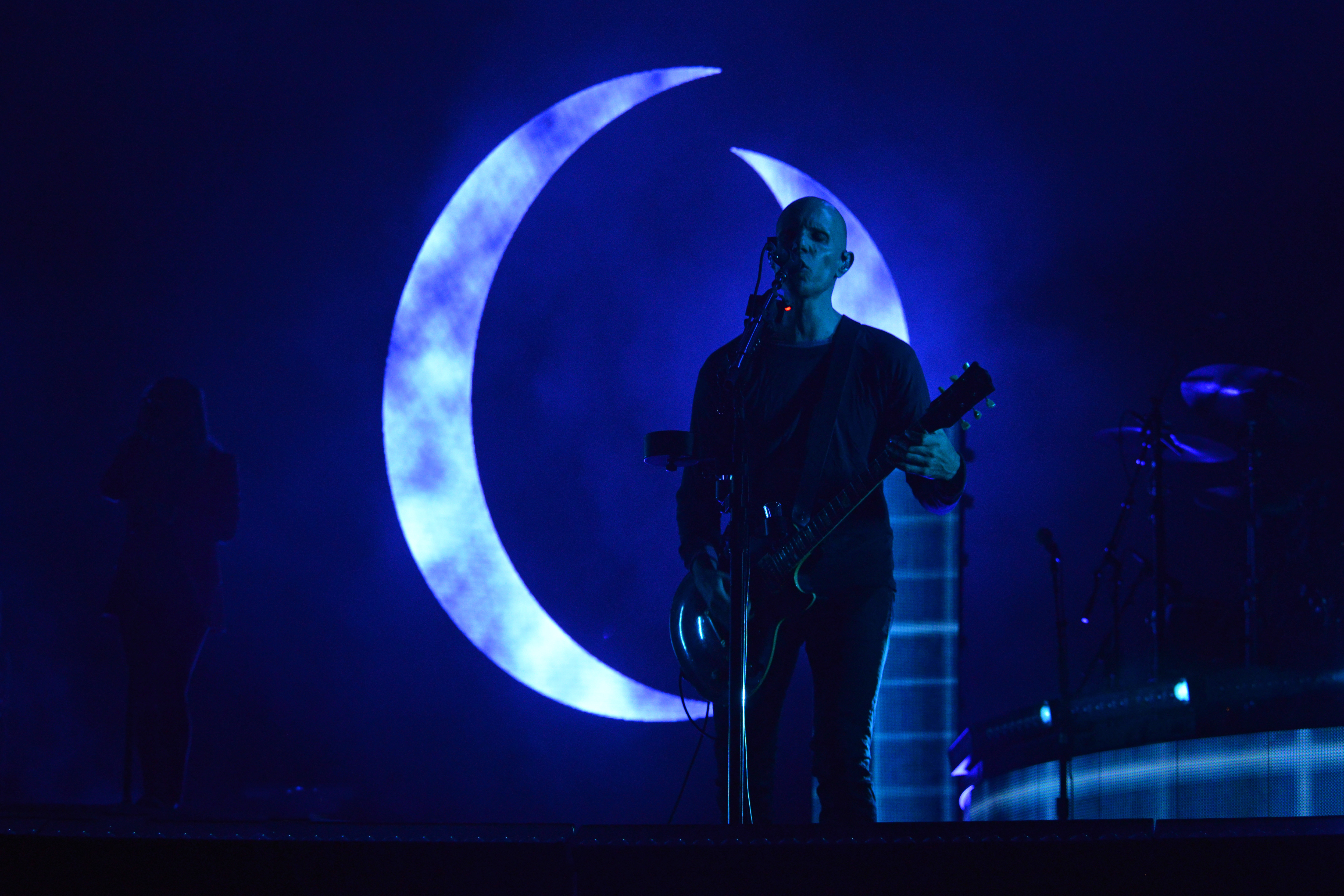 A Perfect Circle, Hellfest 2018.